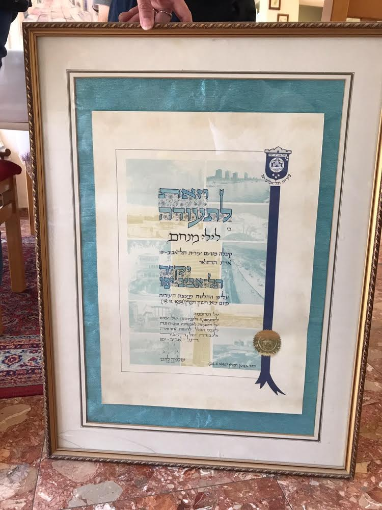 תעודת יקיר העיר תל-אביב - יפו שהוענקה לגב' לילי מנחם